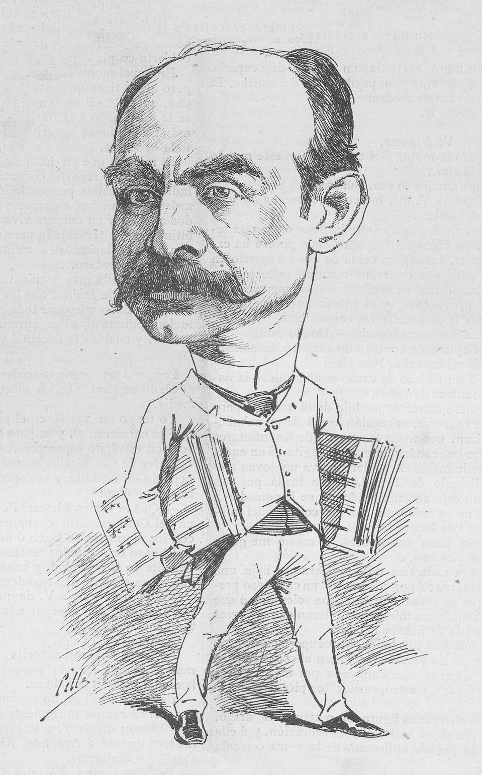 Apolinar Brull.